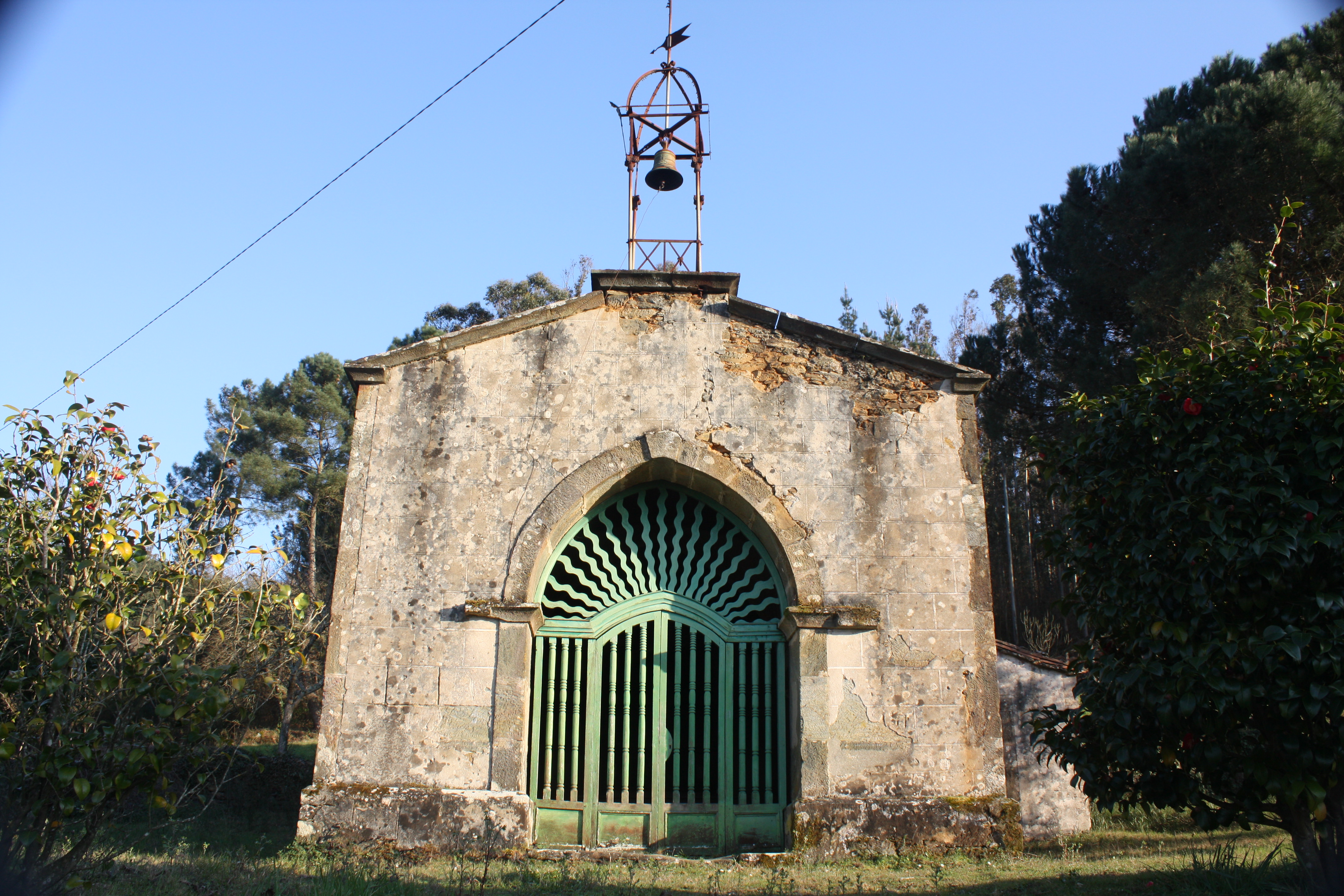 Igrexa de Brocos (Agolada, Pontevedra), xa abandonada